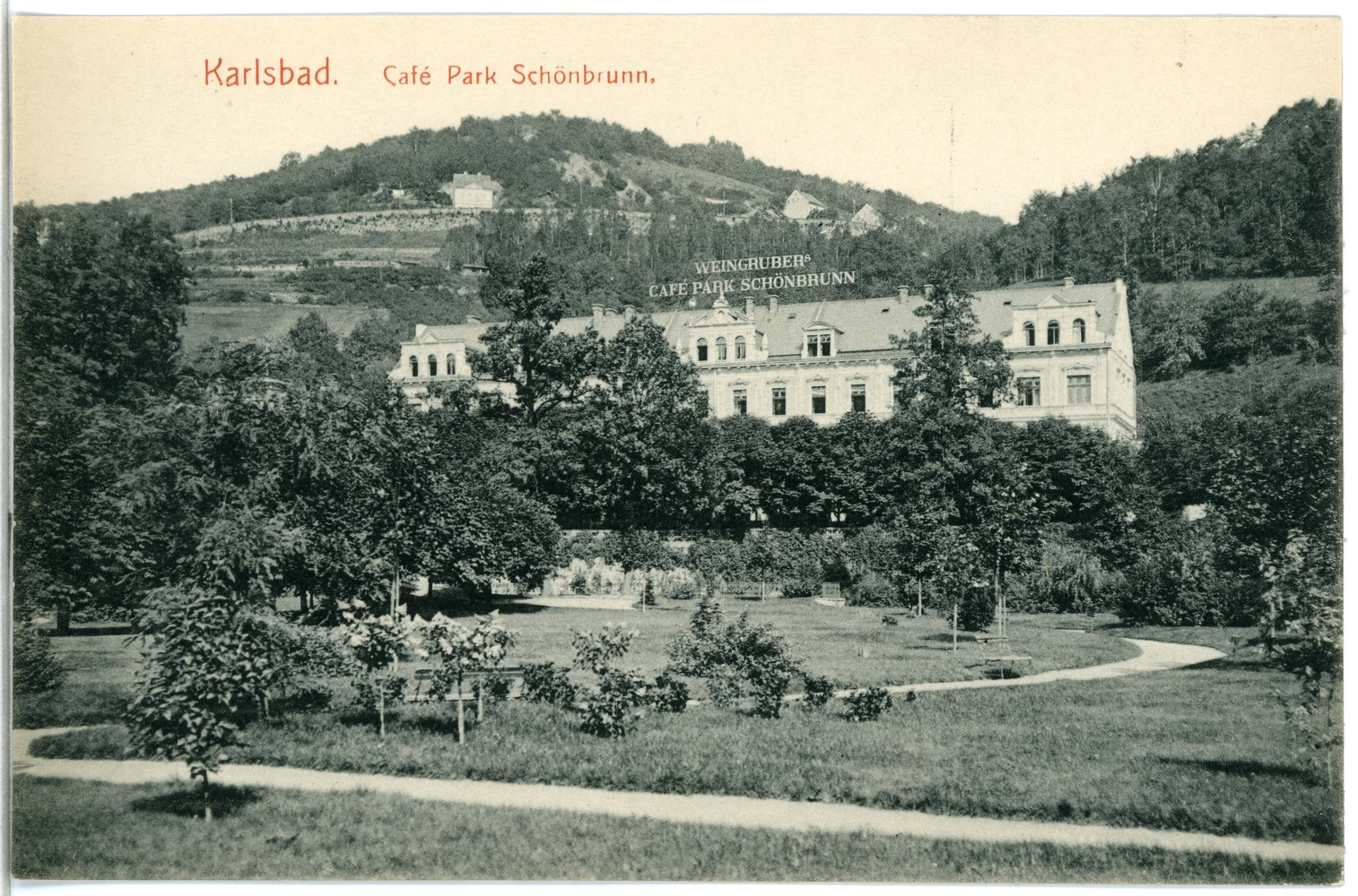 Karlsbad; Cafe Park Schönbrunn This postcard is from publisher Brück & Sohn in Meißen ( This postcard has a unique number 11697 and is available in a higher resolution at the publisher. This images was uploaded in a cooperation project between Wikipedians and the publisher.